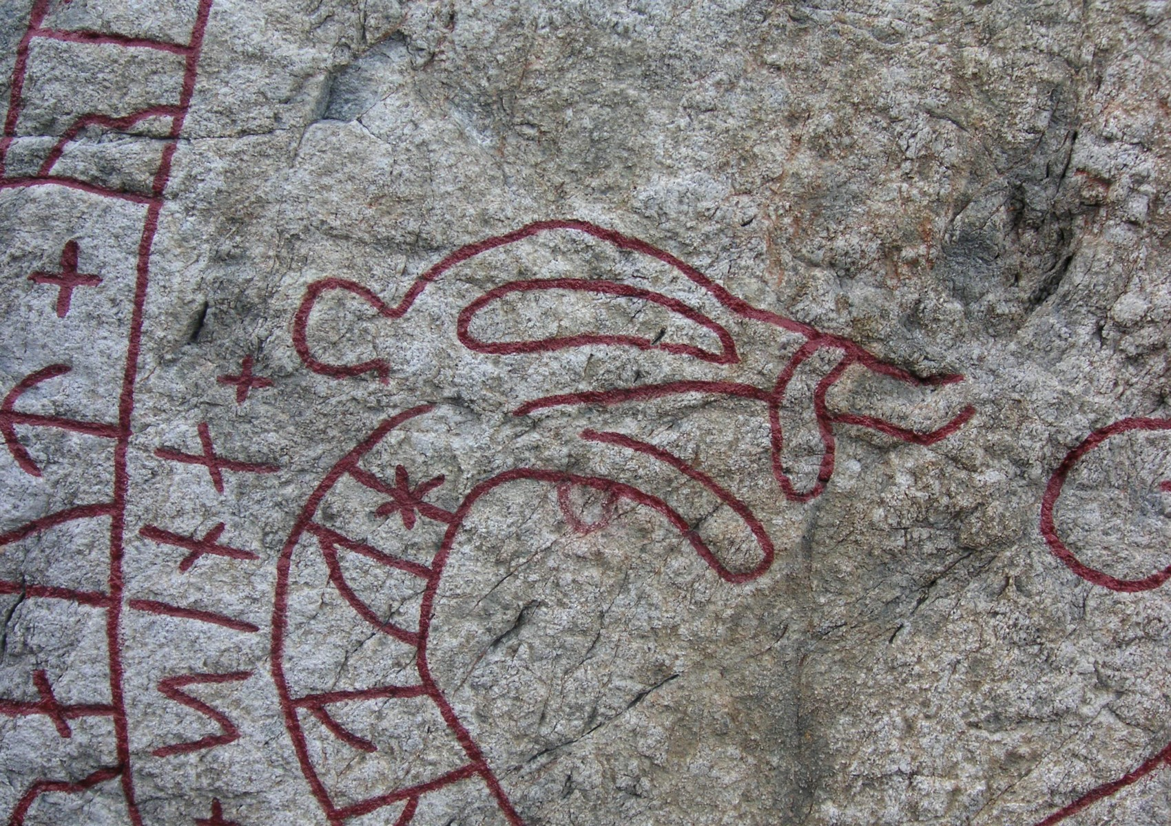 Södermanlands runinskrifter 311-313 är en runinskription i omedelbar anslutning till Holmfastvägen i Södertälje i Sörmland, detalj från Sö 311.